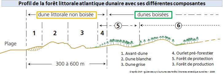 graphique complété et simplifié d'après le guide des sylvicultures des forêts littorales atlantiques dunaires de l'Office national des forêts de 2009